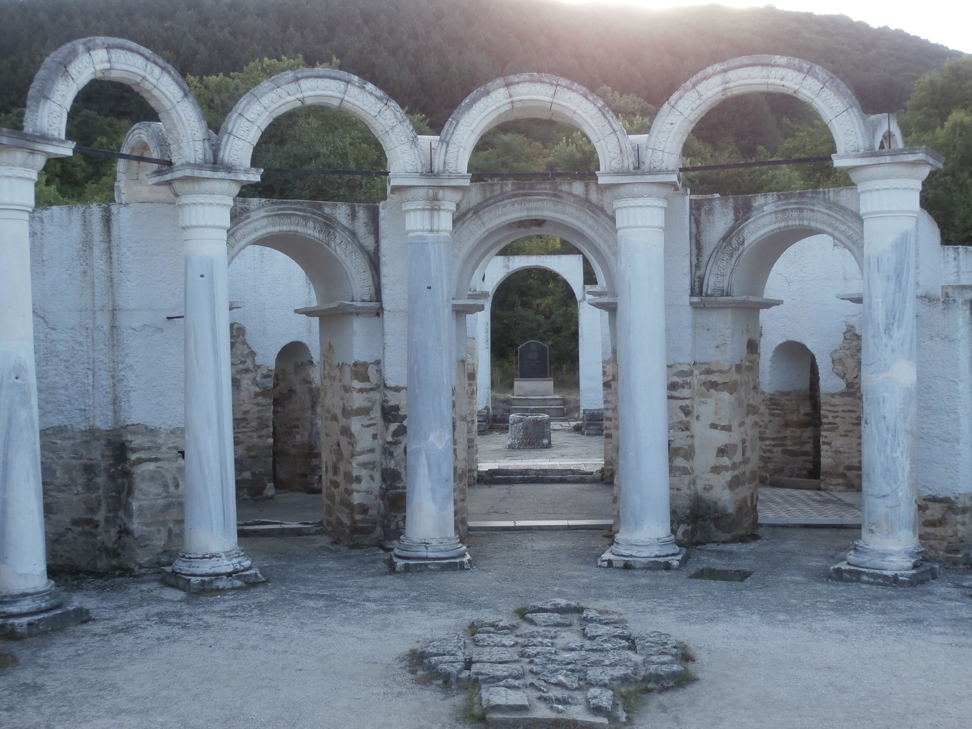 Кръглата църква Преслав